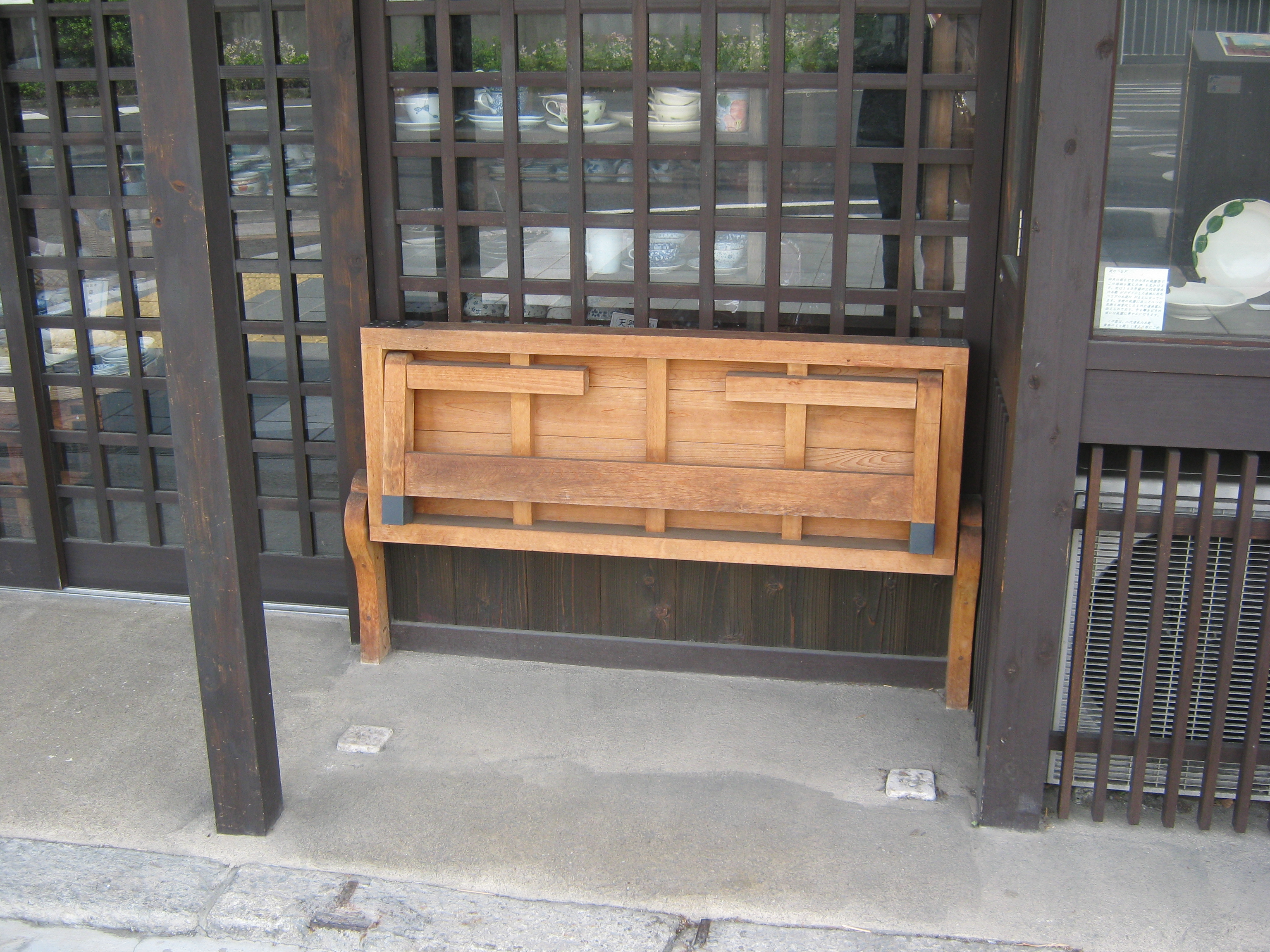 京町家に備え付けられた床几と呼ばれる折りたたみ可能な陳列棚。通称「ばったり床几」。